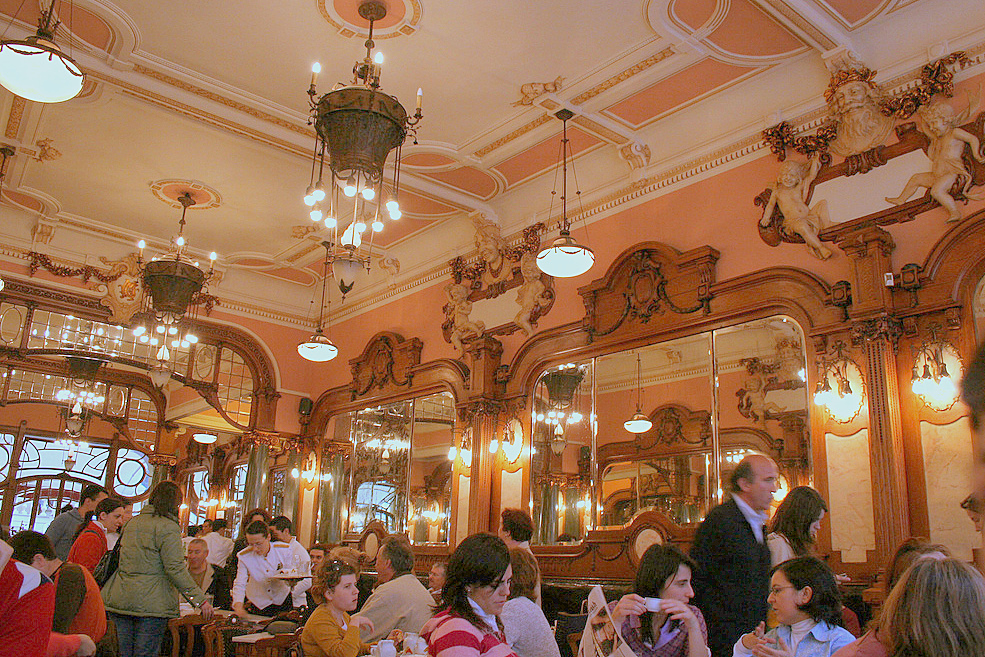 Oporto